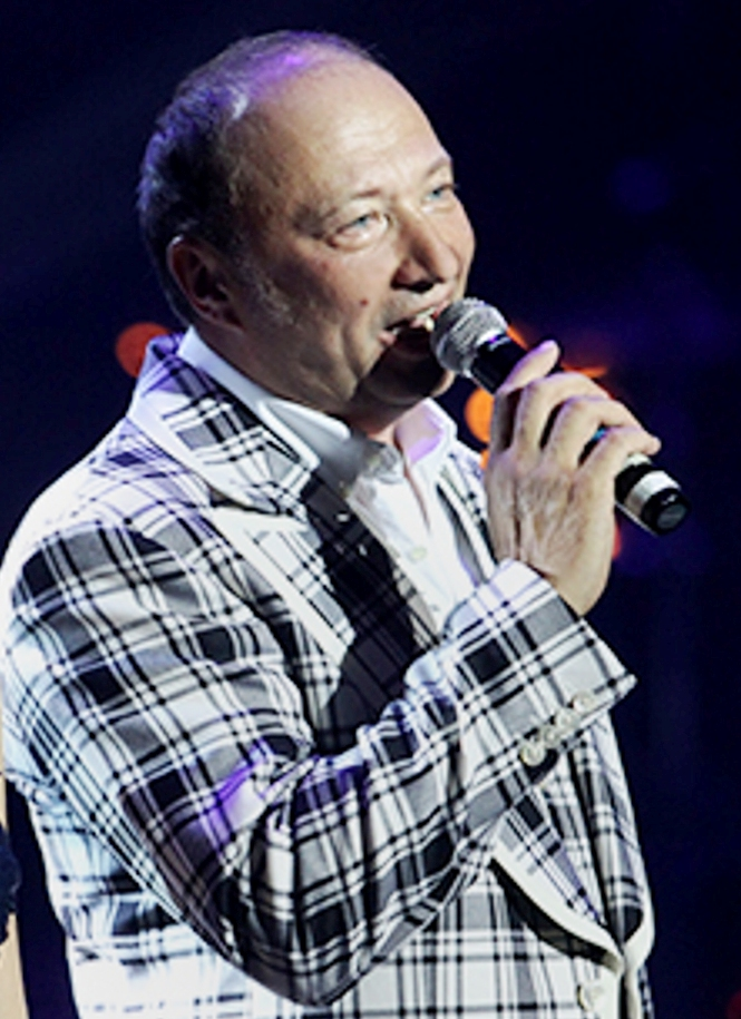 Выступление Юрия Гальцева на праздничном концерте в честь Дня строителя в Центральном академическом театре Российской армии